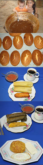 Comida típica de los piñasienses. Manjar, bizcochuelos, humitas, tamales, molloco.